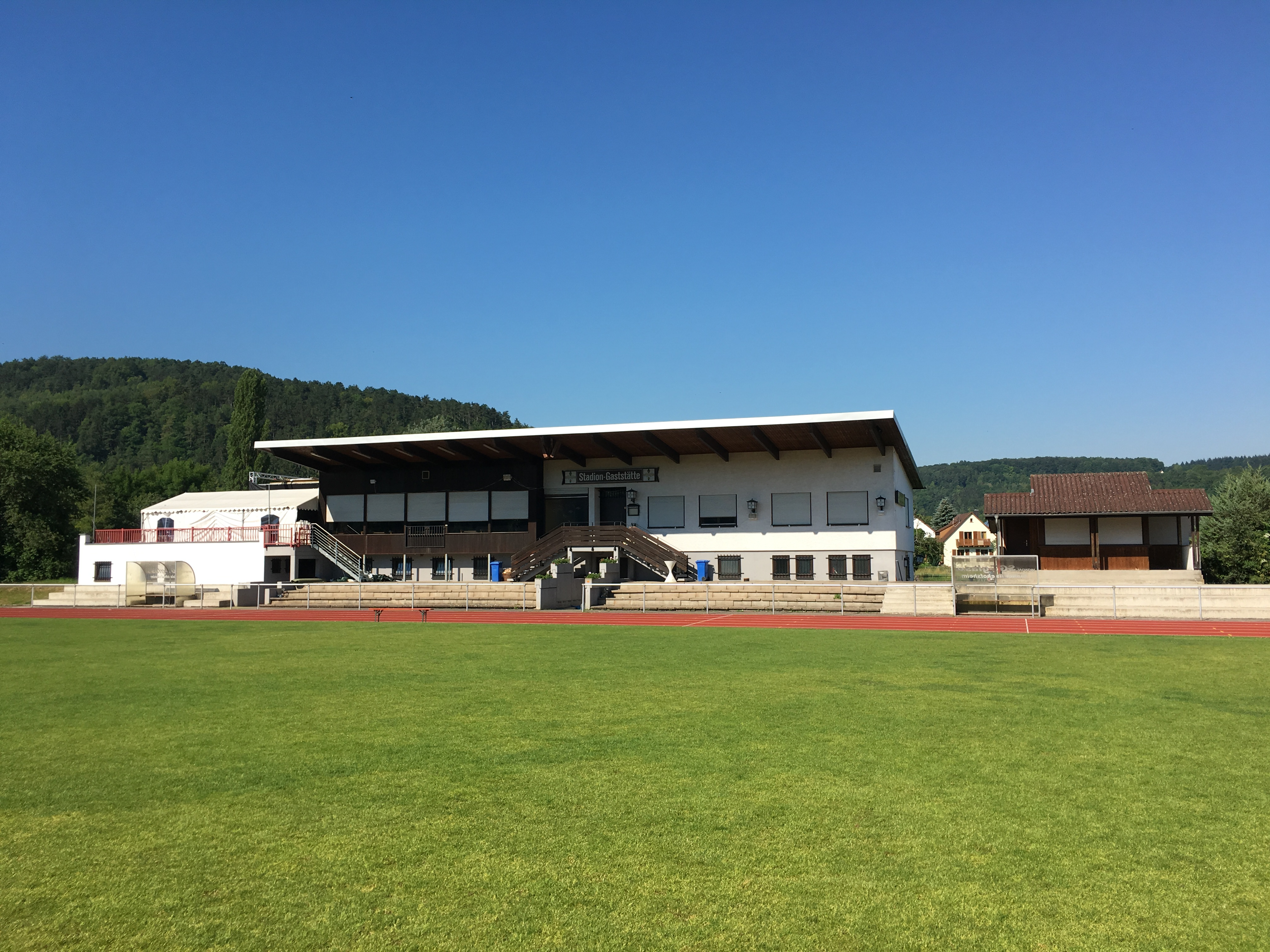 Sportheim - Ansicht Platz "schräg"